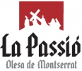 Logotipo de La Passió d'Olesa